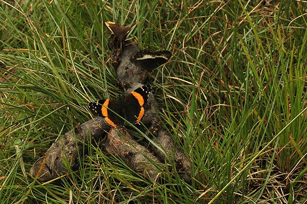 Uganda Mgahinga NP, SW Uganda